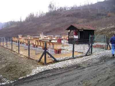 Ekološki pčelinjak